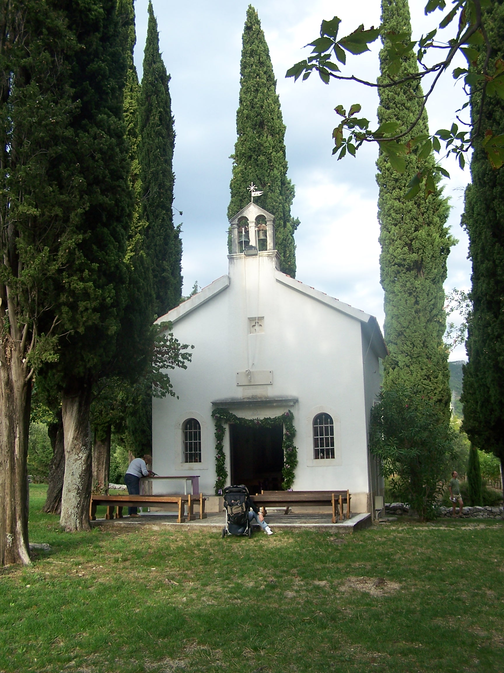 Kirche im Biblischen Garten Gospa Stomorija Kaštel Novi (Dalmatien)